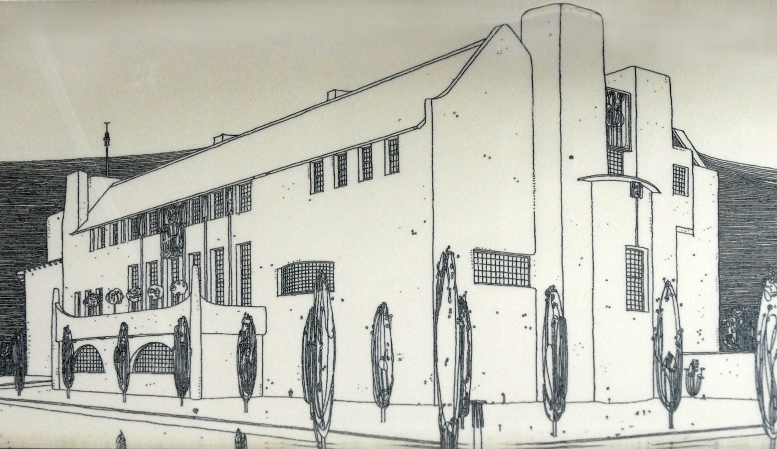 Le dessin original du concours La "Maison pour un amateur d'art" a été reconstituée, à partir des dessins et des plans de l'architecte, peintre et designer Charles Rennie Mackintosh. Construite dans le parc Bellahouston, elle fait partie de l'offre culturelle de la ville de Glasgow en hommage au fondateur du "Glasgow Style" et à son épouse, artiste également : Margaret Macdonald. En 1901, Charles Rennie Mackintosh a participé à un concours lancé par un magazine de design allemand : Innendekoration pour la création d'une maison destinée à un amateur d'art. Aucune contrainte n'était imposée et les artistes ont ainsi pu s'exprimer librement. Mackintosh a été disqualifié car il n'avait pas fourni à temps le nombre de dessins attendus mais sa proposition artistique, à laquelle a contribué son épouse, a été considérée comme un chef-d'oeuvre. Les dessins ont été publiés l'année suivante mais la maison qui constitue la synthèse du "Glasgow Style" n'a pas été construite du vivant de son créateur. Dans les années 80, un ingénieur de Glasgow G. Roxburgh et un architecte : Andy MacMillan ont eu l'idée de la construire en respectant scrupuleusement le projet initial. Après plusieurs années de recherche de financement et de travaux associant de nombreux artisans, artistes et enseignants de l'Ecole d'art de Glasgow (Glasgow School of Art), la maison a été ouverte au public en 1996 dans le parc municipal Bellahouston. Elle est visitable et accueille de nombreuses manifestations publiques et privées dont des mariages comme au moment où nous l'avons visitée.